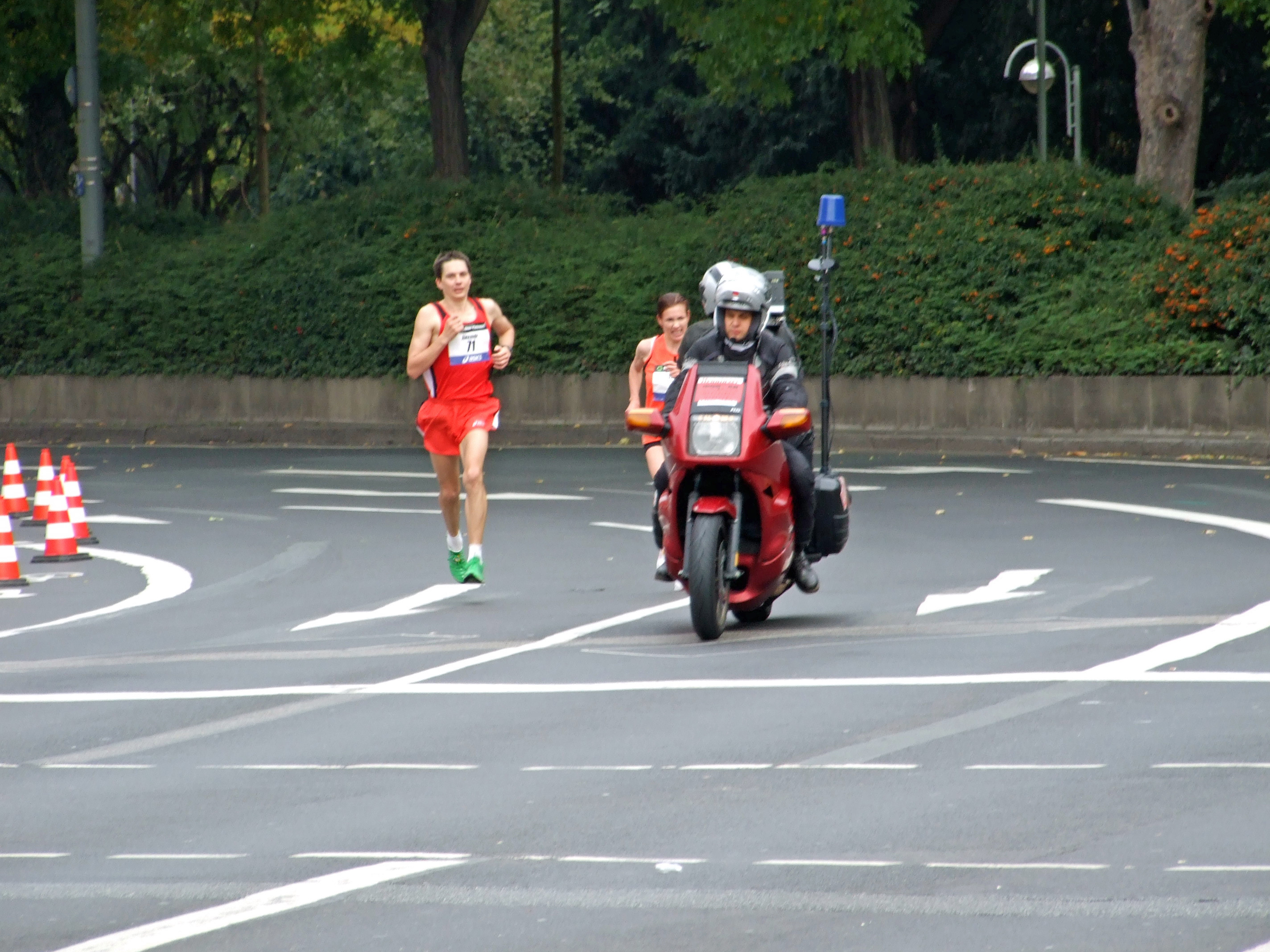 Die Spitze der Frauen mit der (hier noch führenden) Läuferin, Svetlana Zakharova, ca. 3 km vor dem Ziel beim Frankfurt-Marathon, 2007 in Ffm